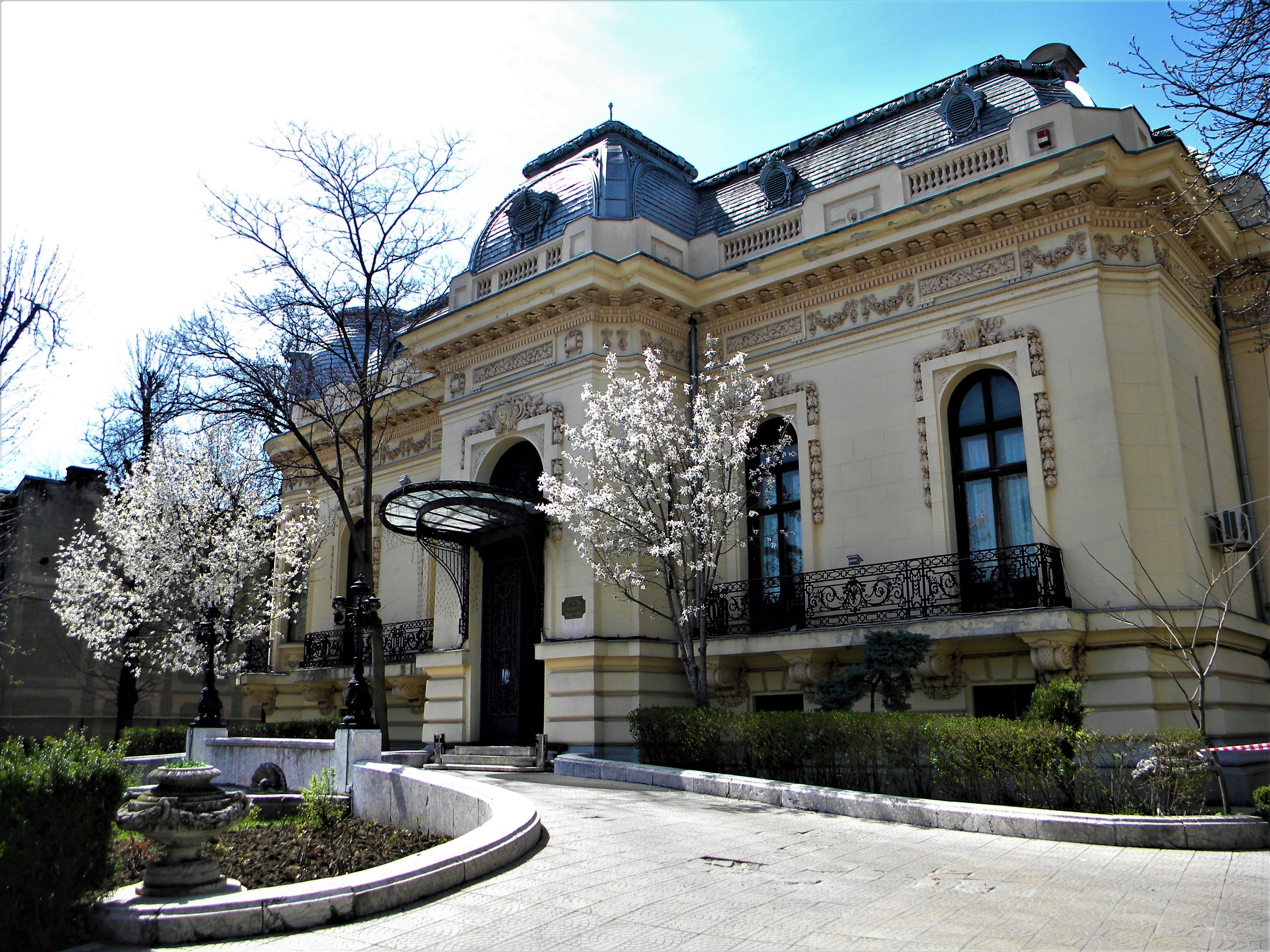 Bucuresti, Romania. Casa Oamenilor de Stiinta. (CASA ASSAN) Aprilie 2018. Magnolii albe inflorite. (B-II-m-B-19009). A fost comanditată de inginerul şi industriaşul Bazil G. Assan şi ridicată în stil neoclasic francez de arhitectul român Ion D. Berindey. Clădirea a intrat în patrimoniul Academiei Române şi din 1945 a devenit Casa Oamenilor de Ştiinţă. Deşi intrarea principală pare a fi cea dinspre Piaţa Lahovari, în realitate curtea din spate ascunde o scară monumentală din piatră ce leagă un spaţiu verde amenajat de clădirea în care există o serie de încăperi maiestoase cu denumiri semnificative: Salonul Oglinzilor şi Candelabrelor, Sala de Şah, Sala Zodiac, luminată printr-un amplu vitraliu cu toate semnele zodiacale, Sala de Consiliu ori Sala Edison